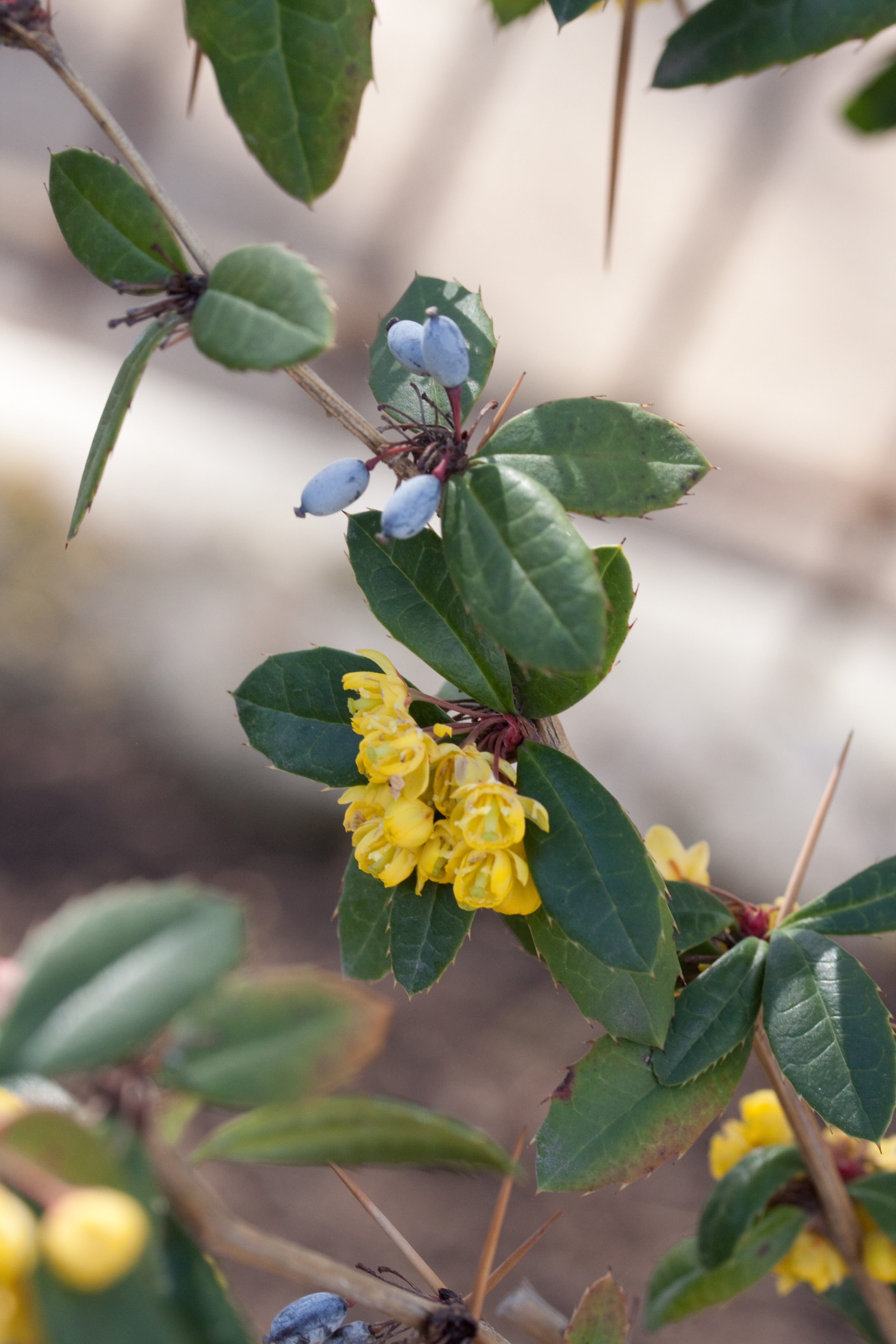 Fleurs et fruits de Berberis julianae - Jardin des Plantes - Paris - France